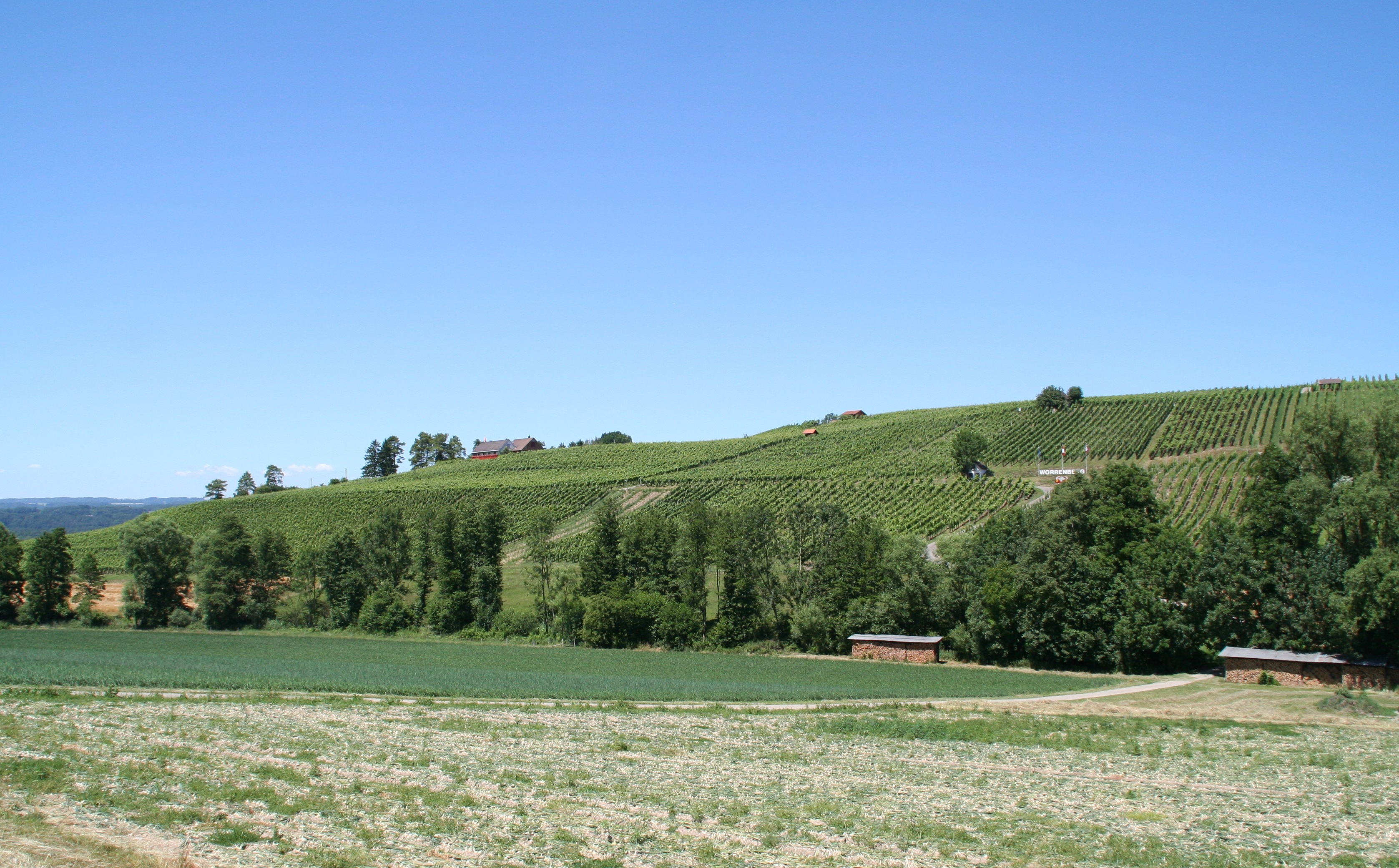 Weinberg Worrenberg bei Volken